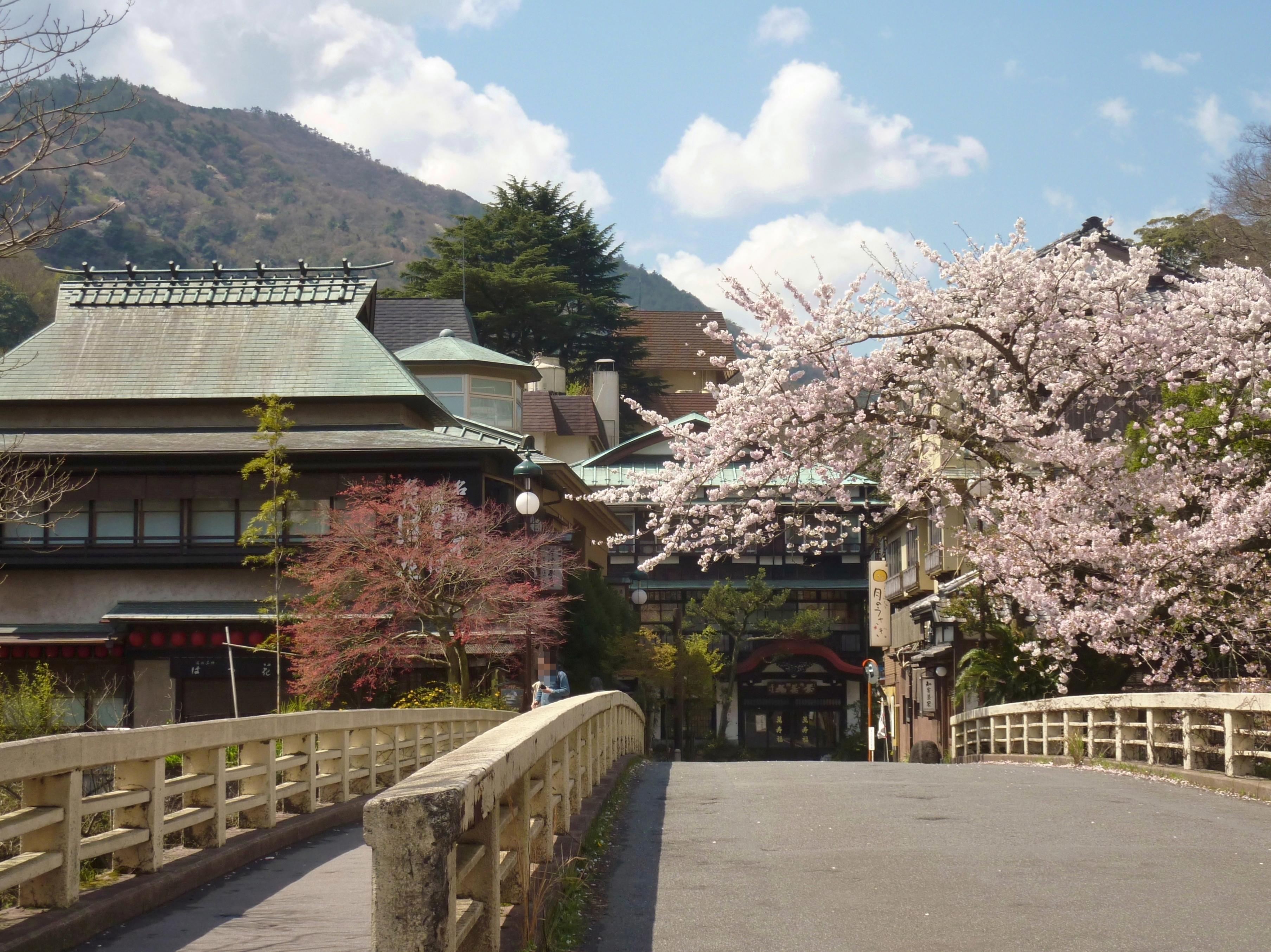 桜の季節の箱根湯本温泉（神奈川県箱根町）